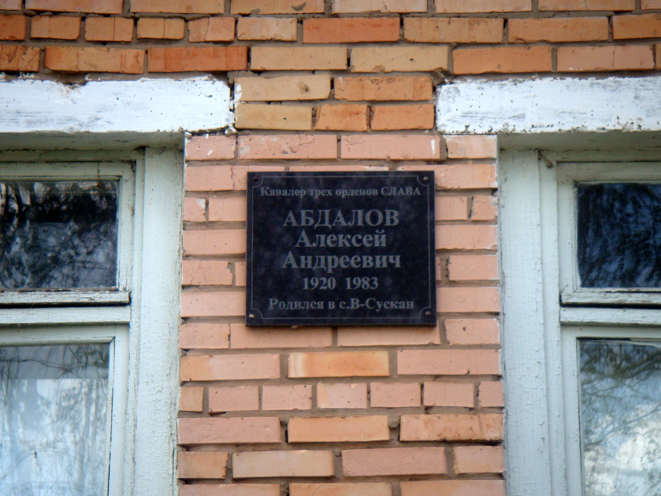 Мемориальная доска, посвящённая полному кавалеры ордена Славы Абдалову Алексею Андреевичу. Установшена на здании сельской школы. Верхний Сускан, Ставропольский район Самарской области, Россия